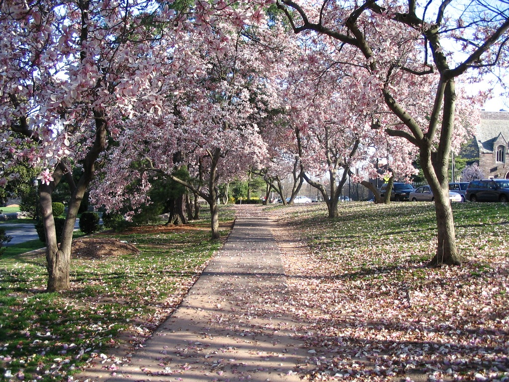 Göngustígur meðfram University Place (séð til suðurs). Vor í Princeton.